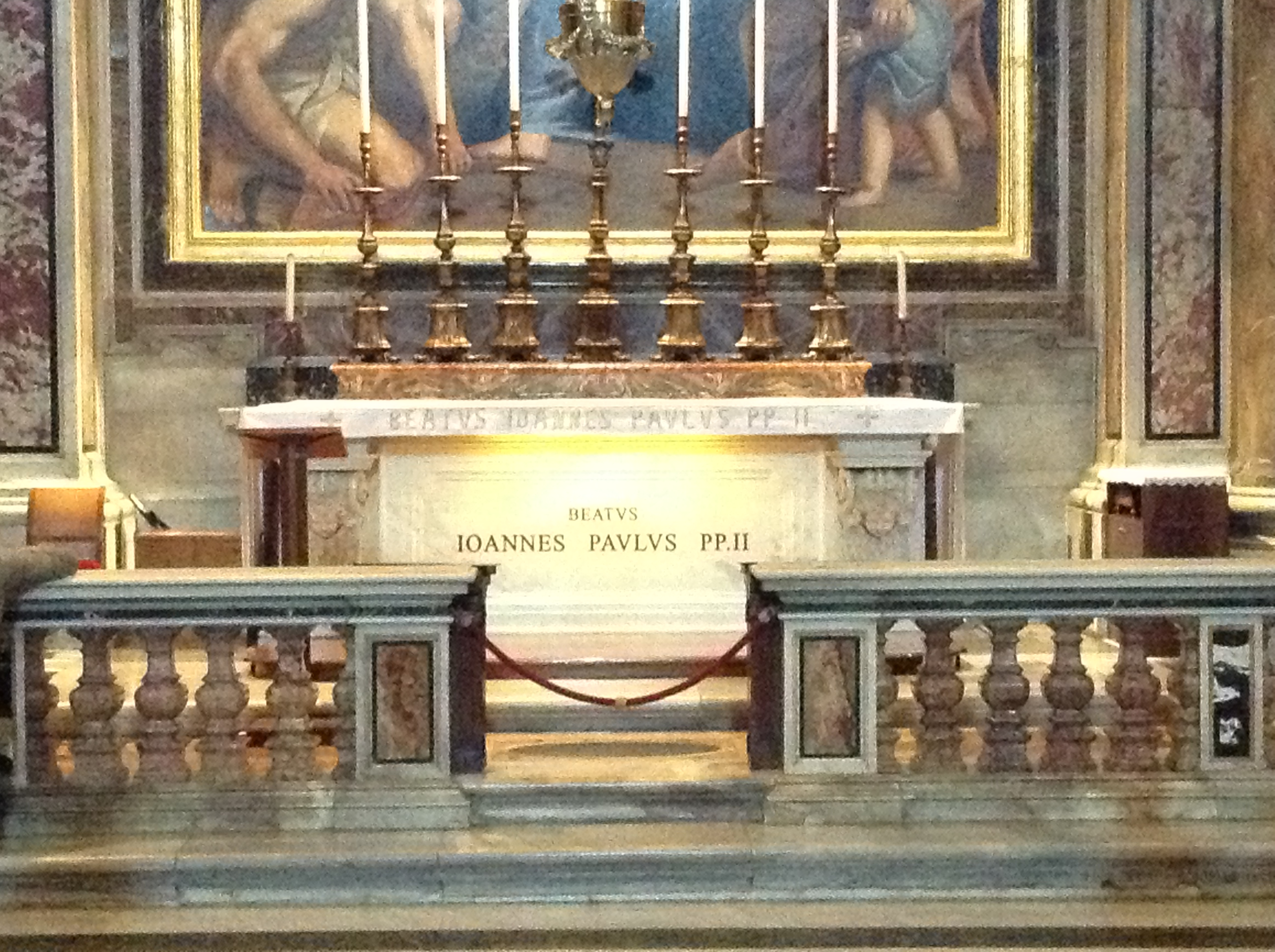 Tumba del Papa Juan Pablo II en la Basílica de San Pedro, en Roma